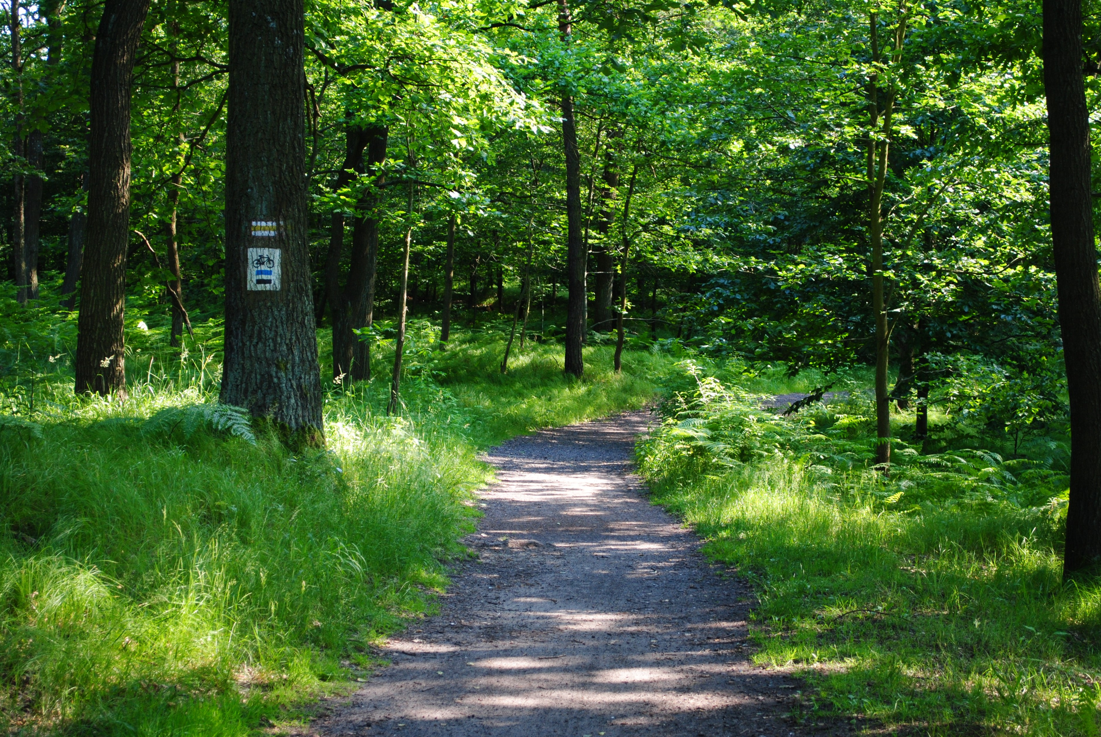 Katowice-Giszowiec. Ścieżka rowerowa pomiędzy stawami Barbara i Janina